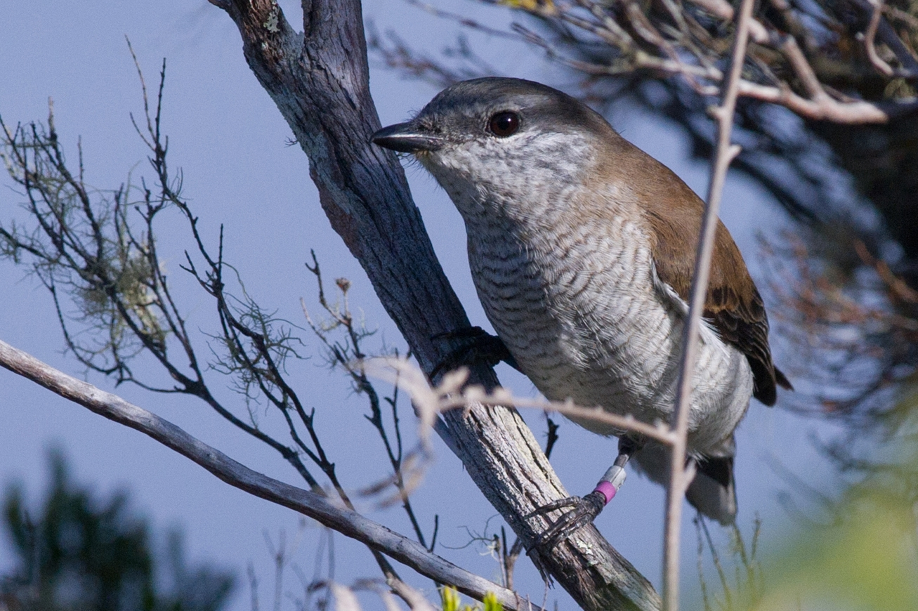 Tuit-tuit (Coracina newtoni) Femelle adulte avec une bague couleur.